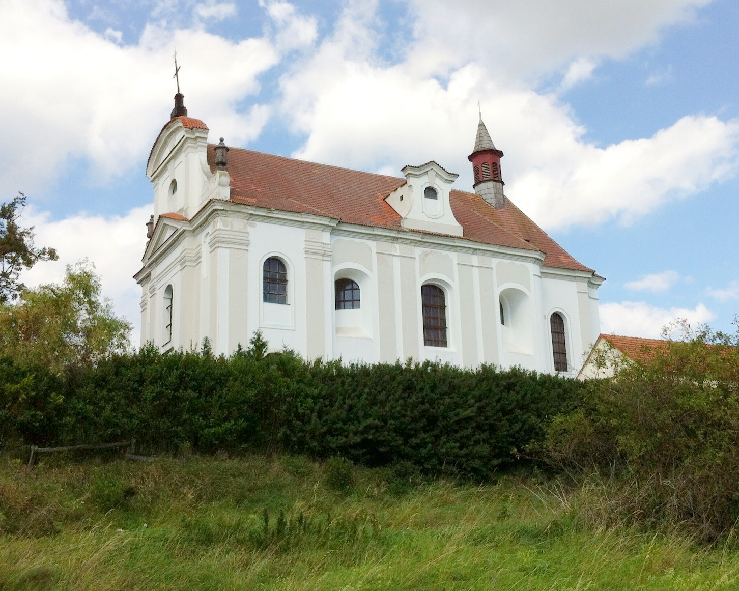 Kostel sv. Jana Křtitele v Radomyšli z jihu